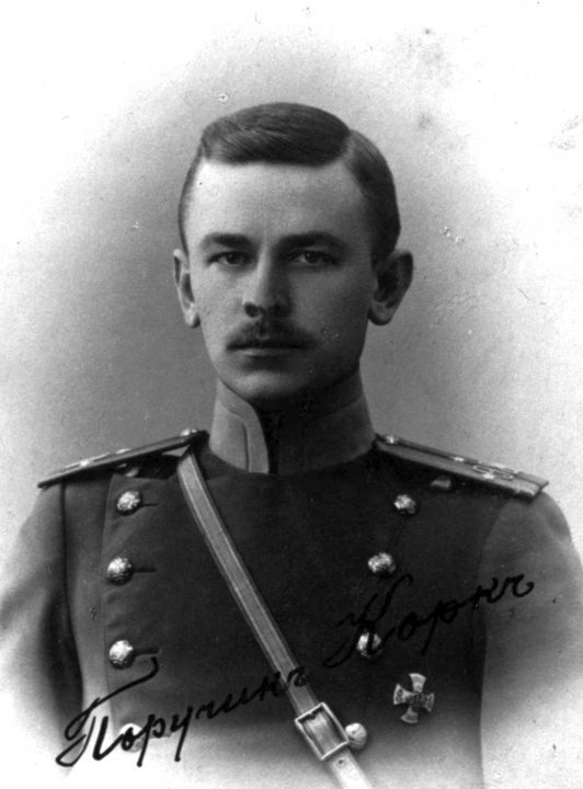 Поручик Август Иванович Корк